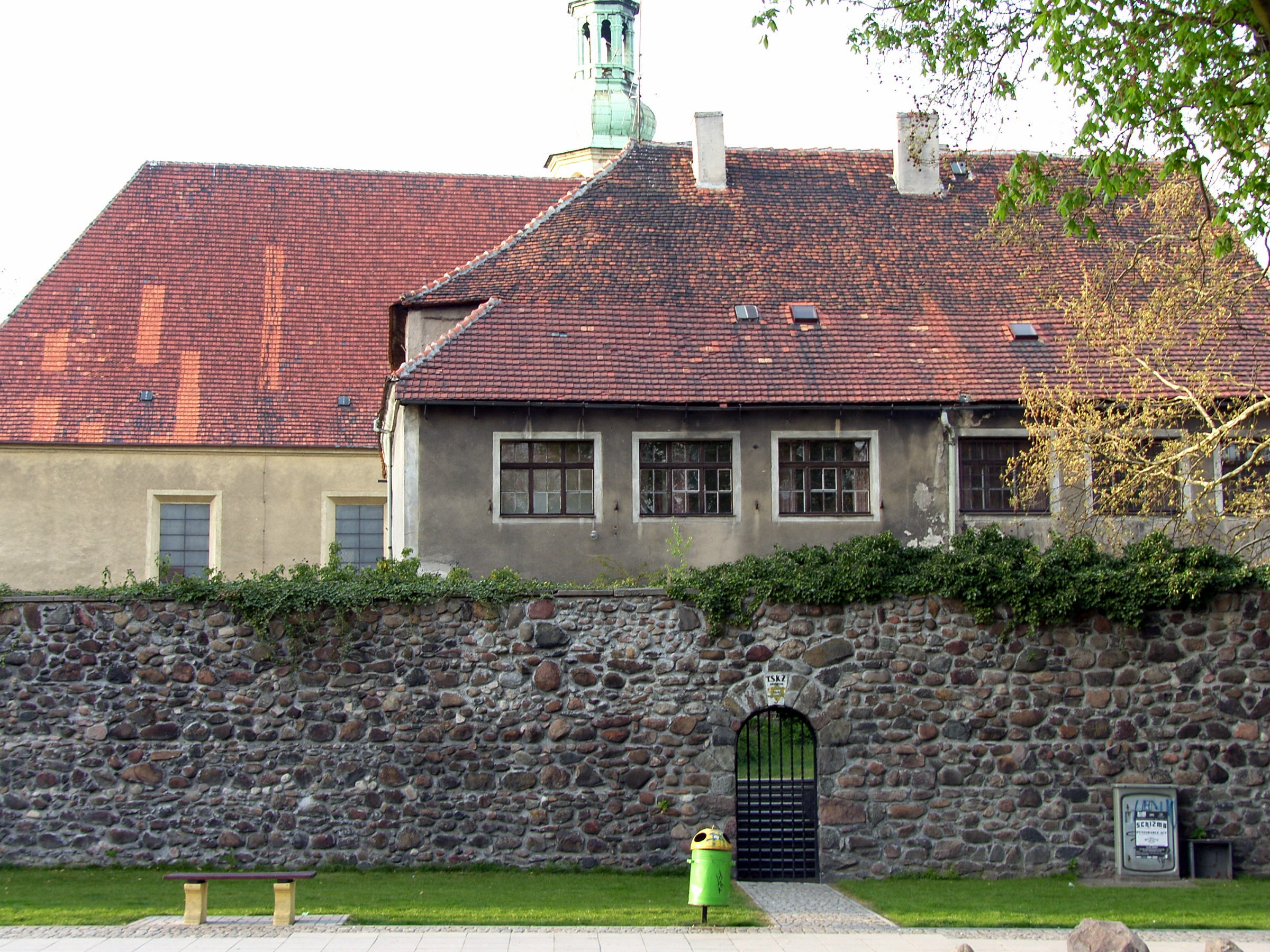 Żary, zespół klasztorny franciszkanów, XIII, XIX, XX